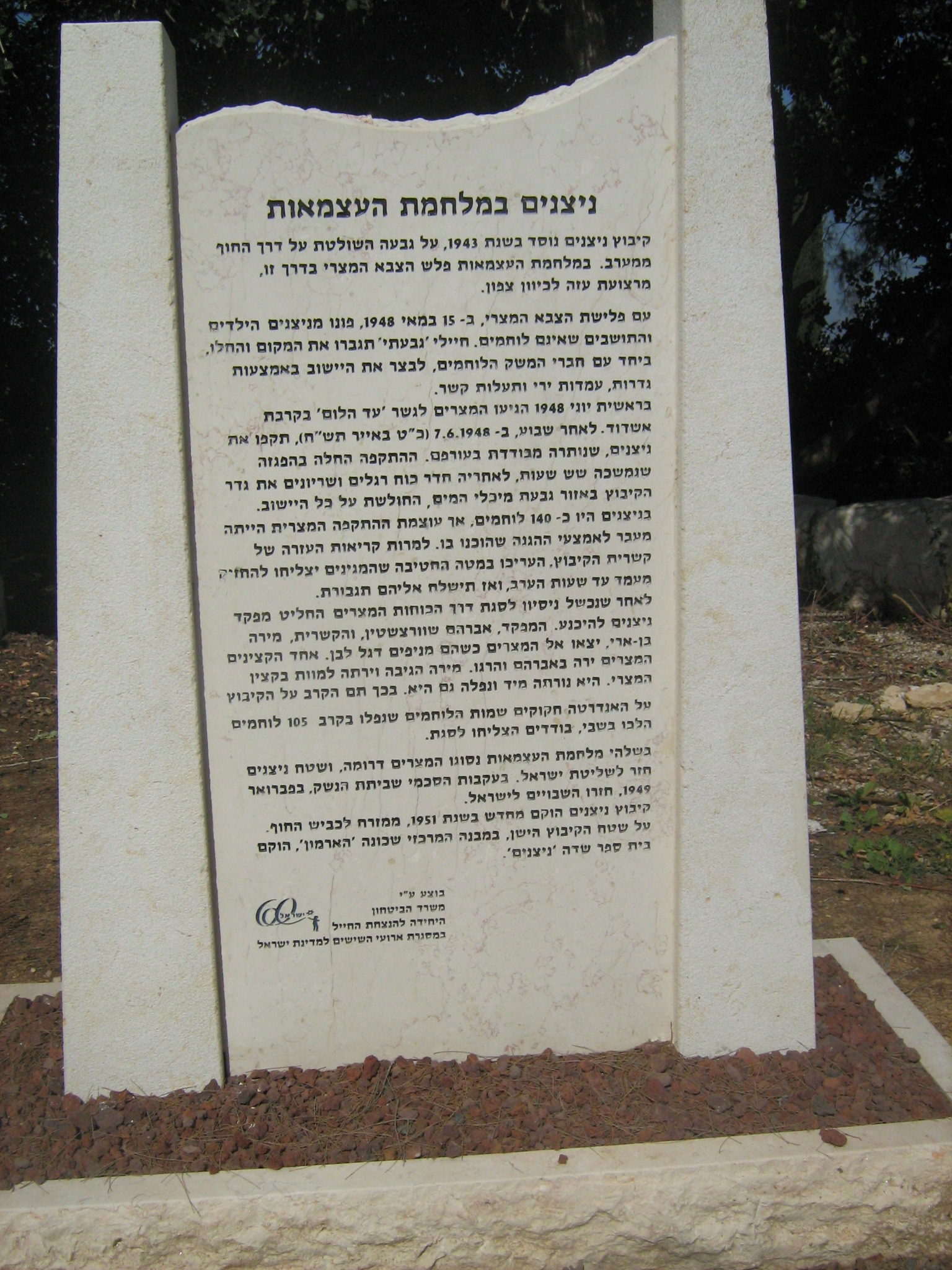 ניצנים